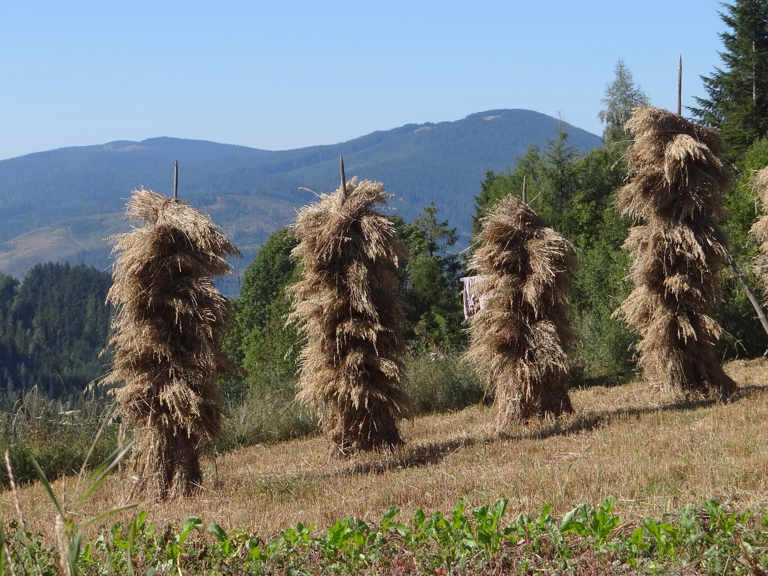 Zbocza Zapolankia, w głębi Muńcoł